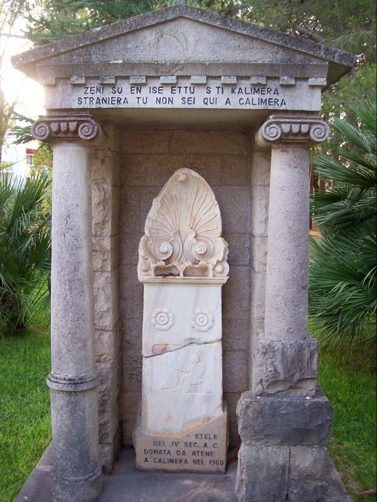 Stele di Calimera (LE), Italia.